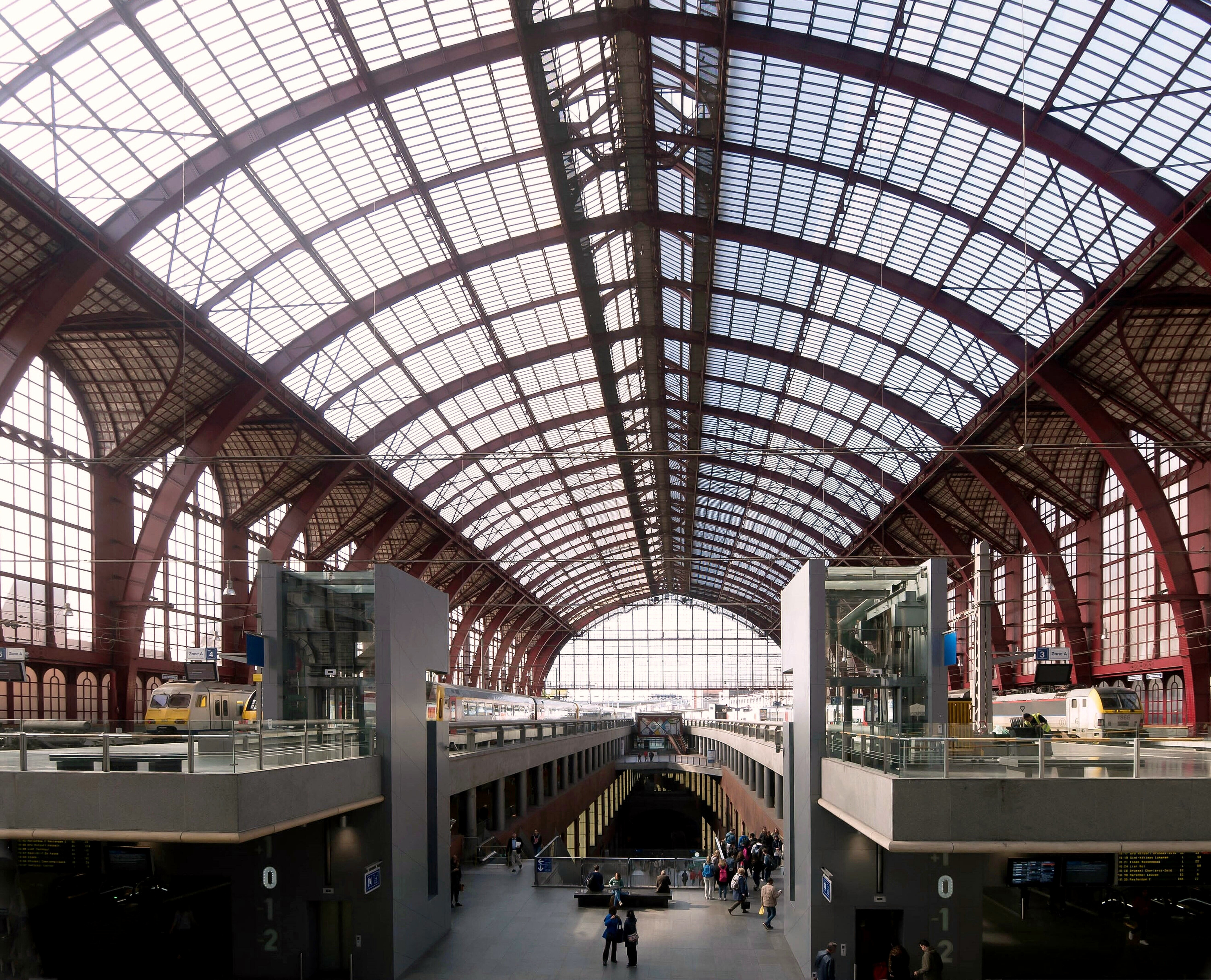 Die Bahnsteighalle beeindruckt durch ihre symmetrische Geometrie in Stahl und Glas.